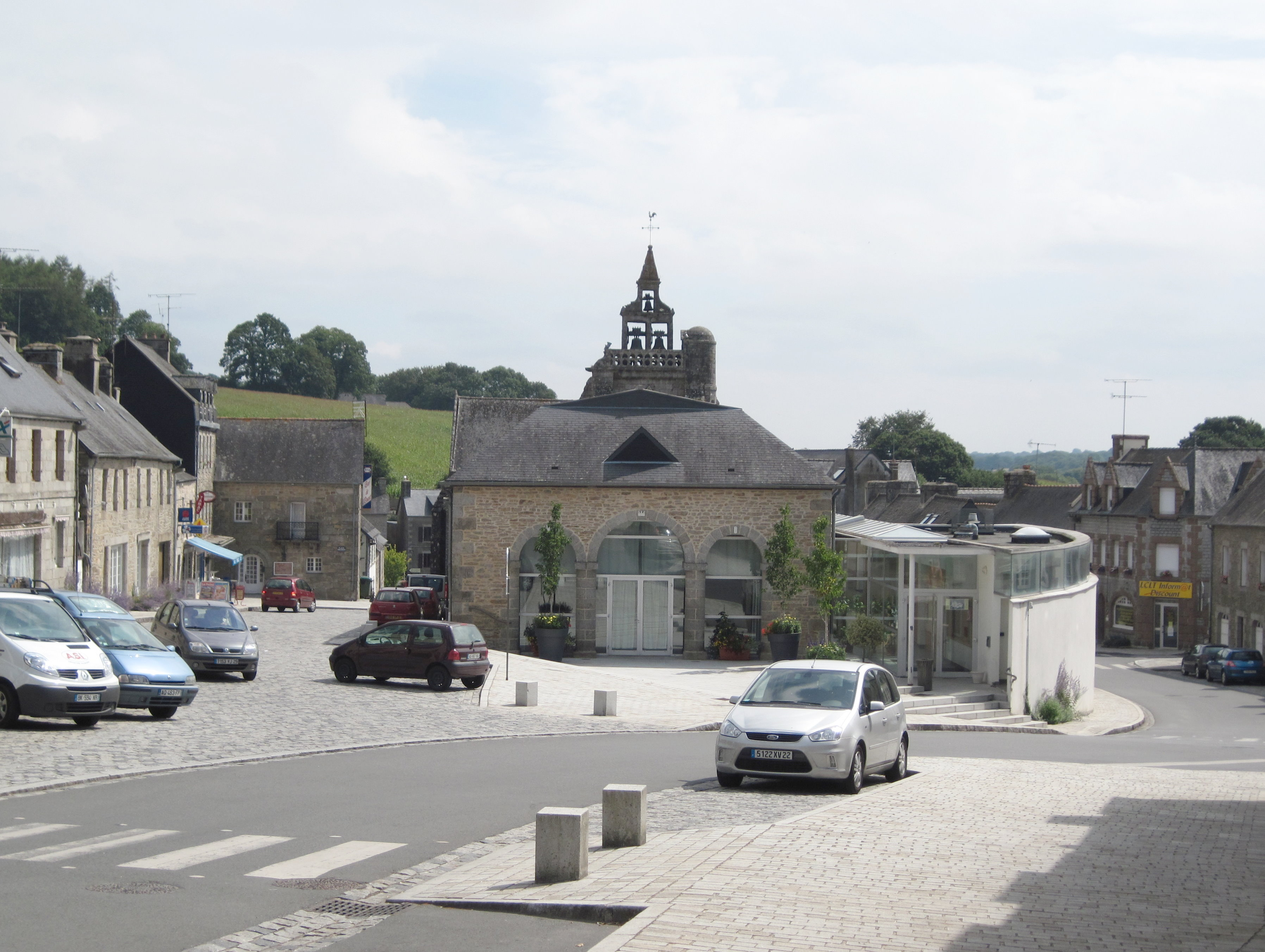 Saint Nicolas du Pélem - Place Kreisker